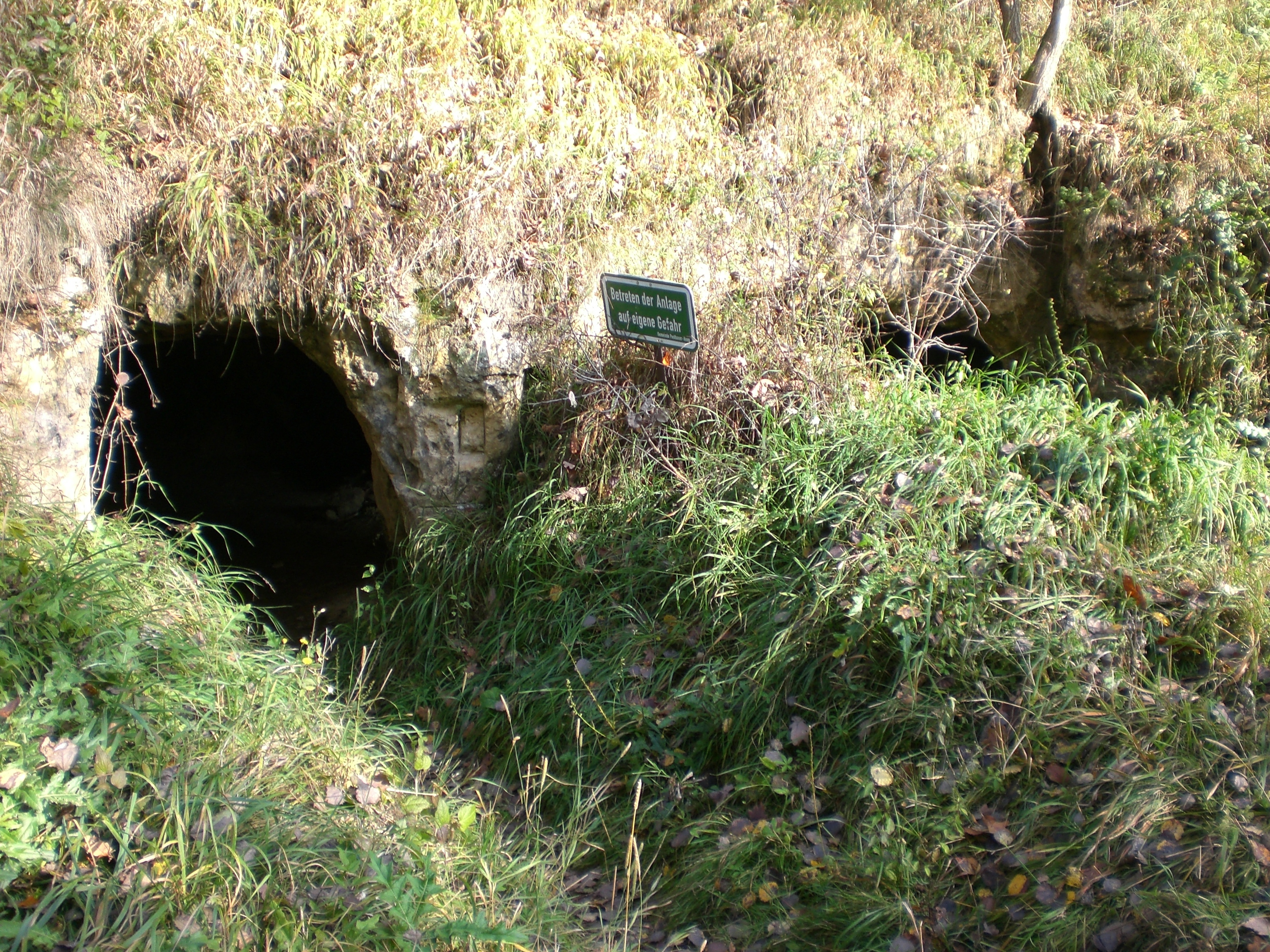 Silbersandhöhle am Dillberg